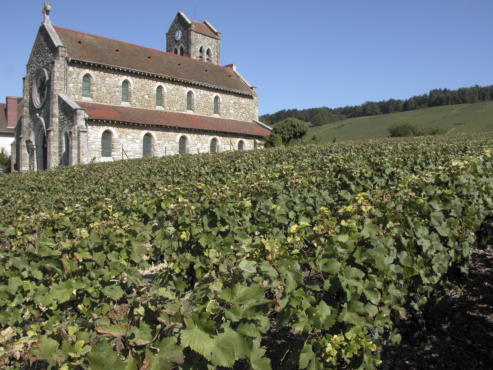 INRA, Jean Weber